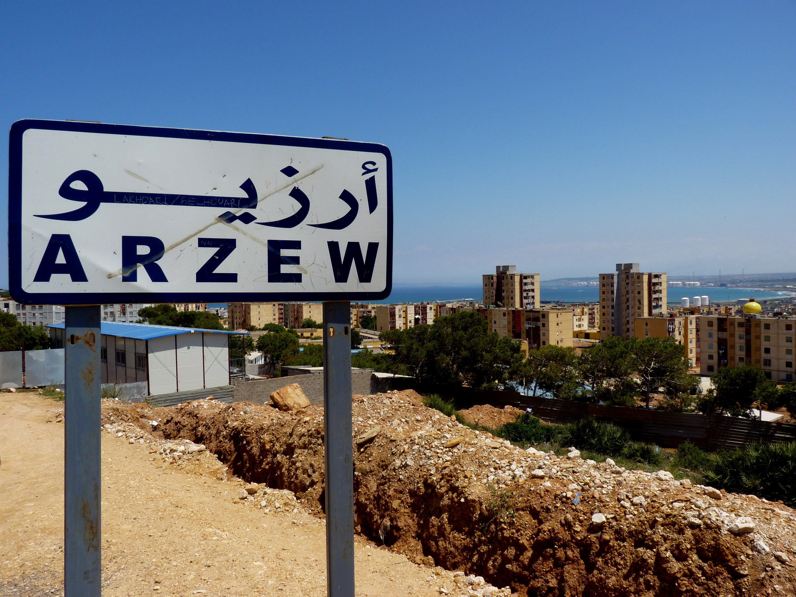 Algérie Mai 2011